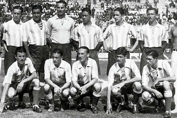 Selección Argentina en el mundial de italia 1934 frente a suecia